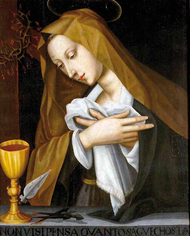 Pained Madonna